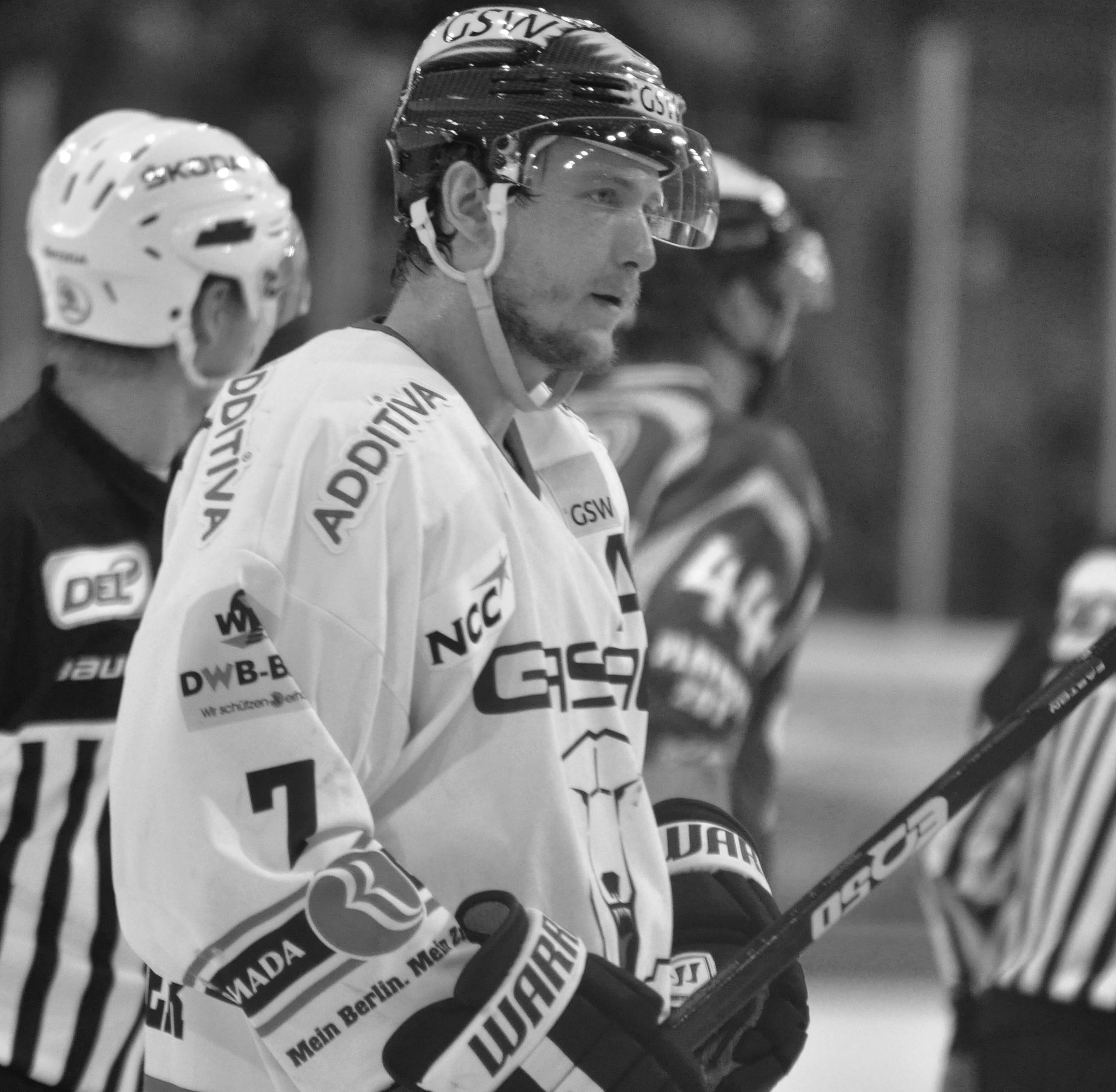 Straubing Tigers - Eisbären Berlin 11.04.2012, DEL PlayOff Halbfinale